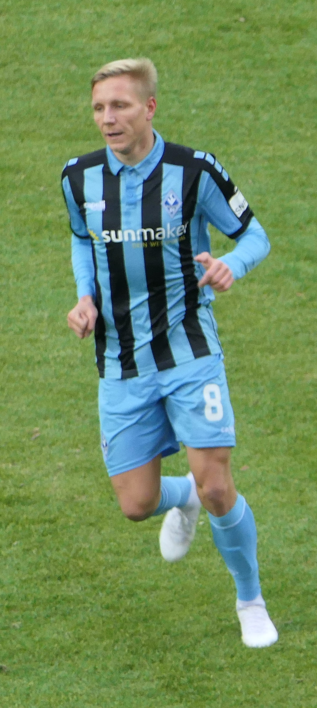 Der Fussballprofi Dorian Diring im Trikot vom SV Waldhof Mannheim beim Heimspiel gegen Eintracht Braunschweig am 08.12.2019.